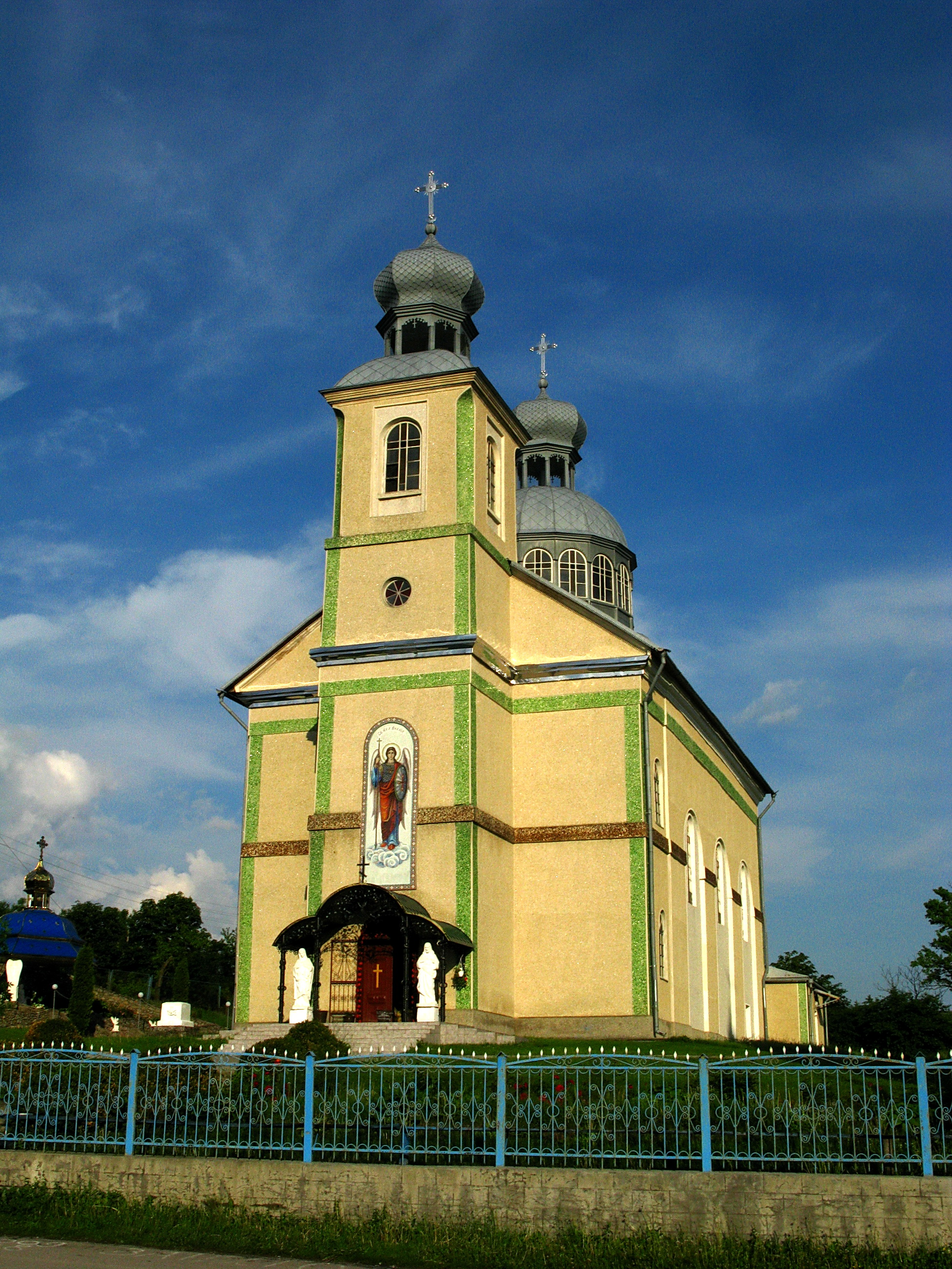 Церква Св.Михаїла, Більче-Золоте